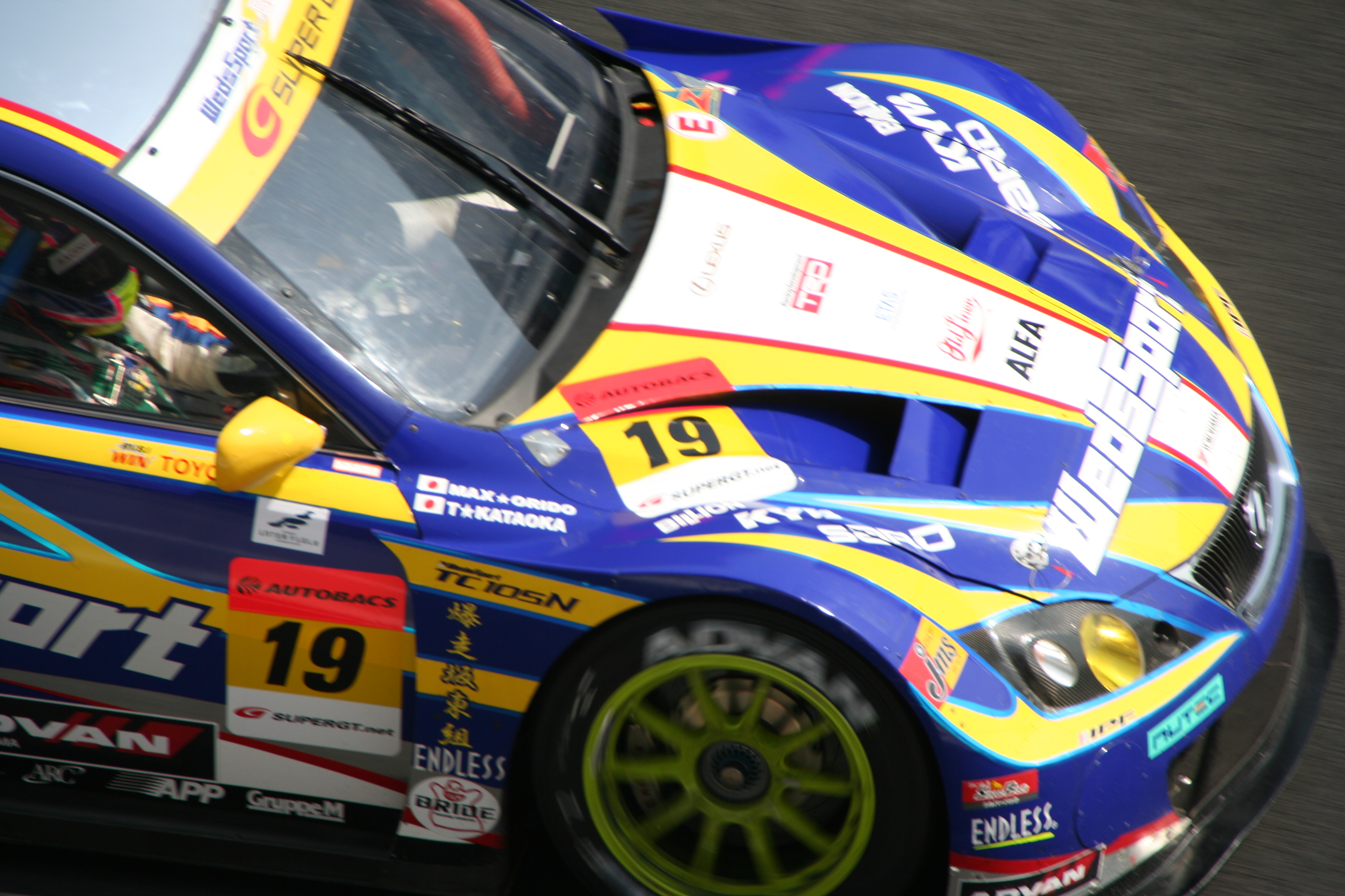 ウェッズスポーツIS350 at Suzuka